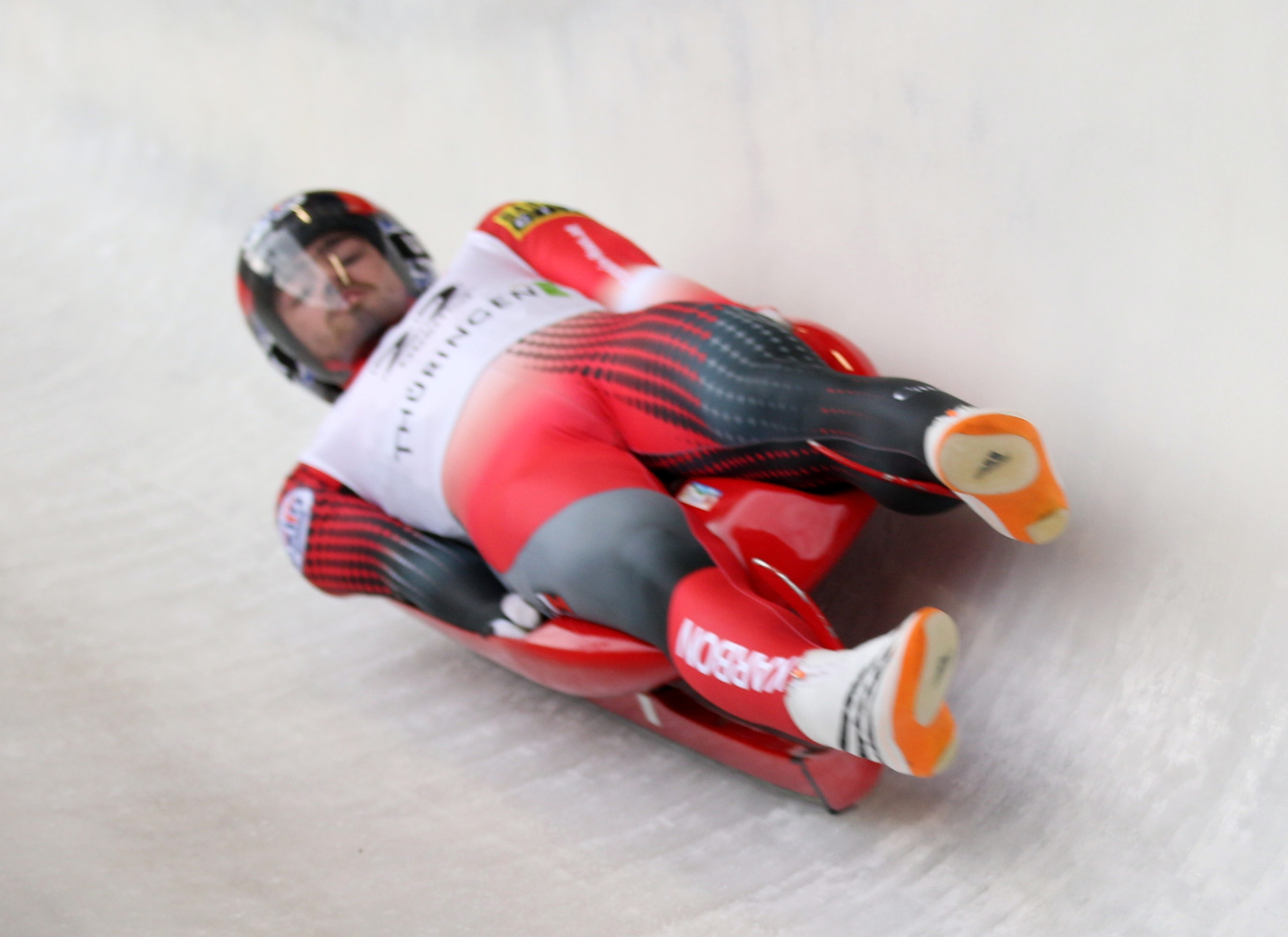 Nicholas Klimchuk-Brown beim HELABA Nationscup der Herren in Oberhof 2017